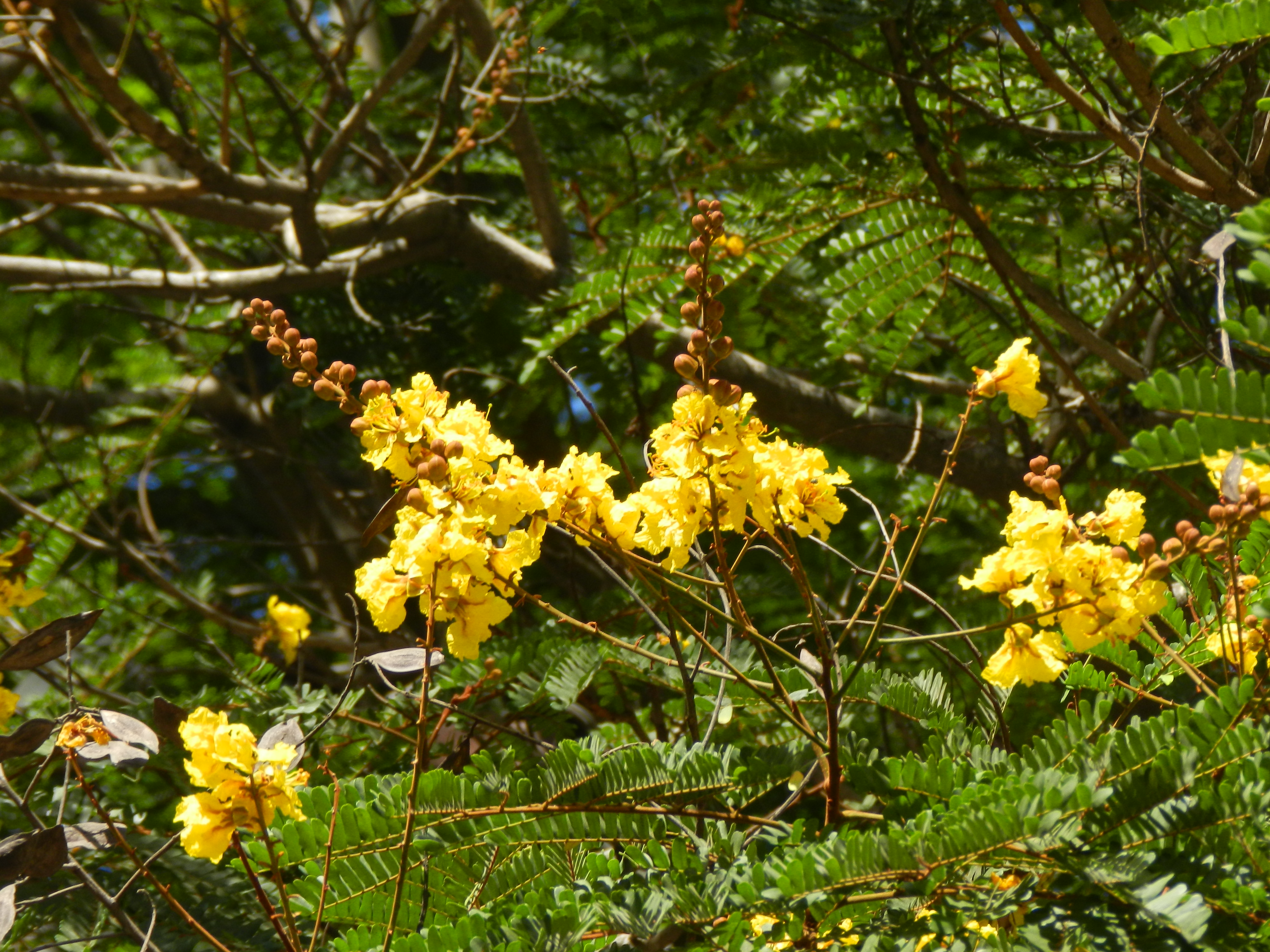 ताम्रवृक्ष